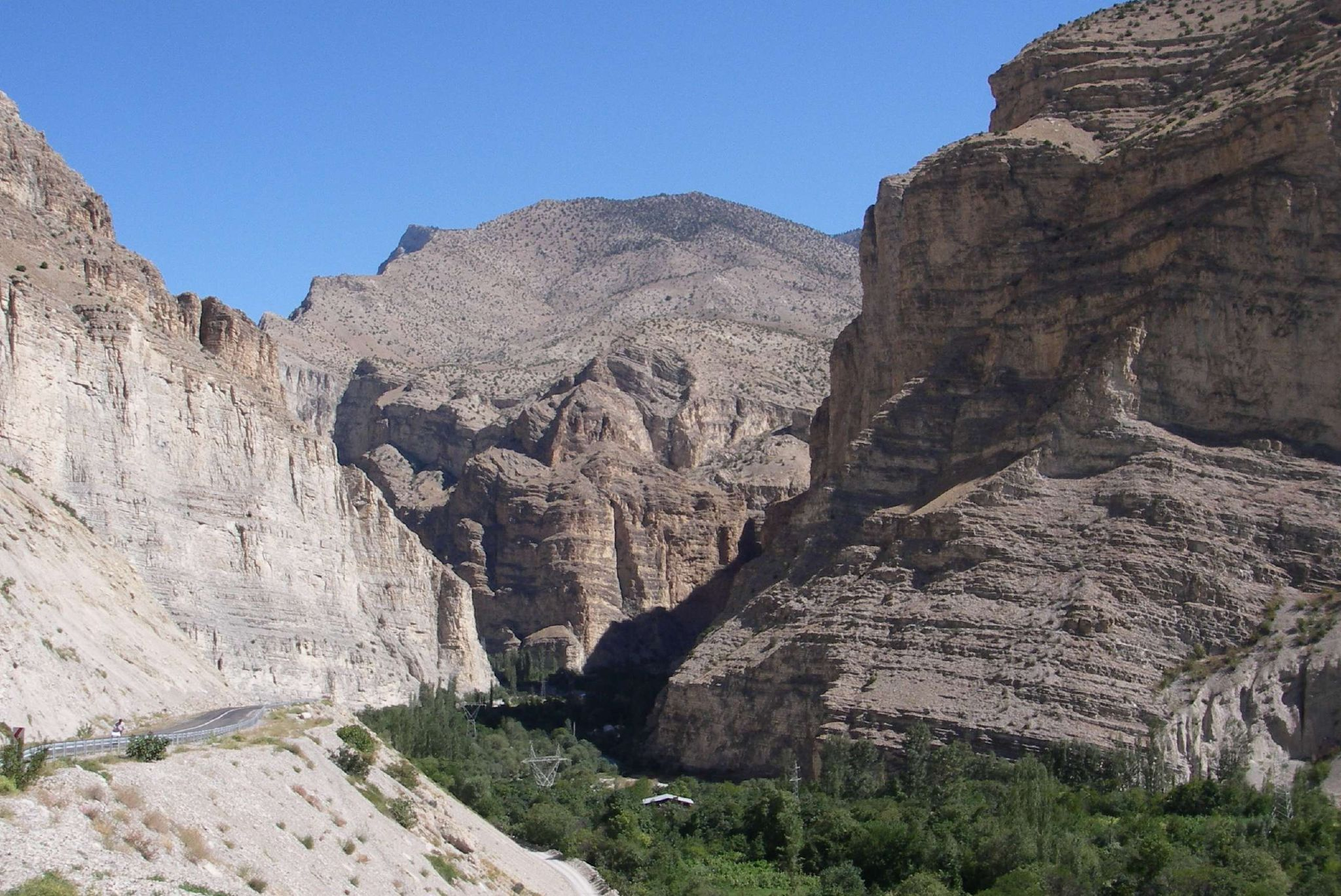 Tortum Valley